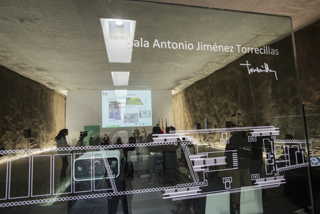 Sala de Exposiciones y actos culturales «Antonio Jiménez Torrecillas», integrada en la Estación Alcázar Genil del Metro de Granada.